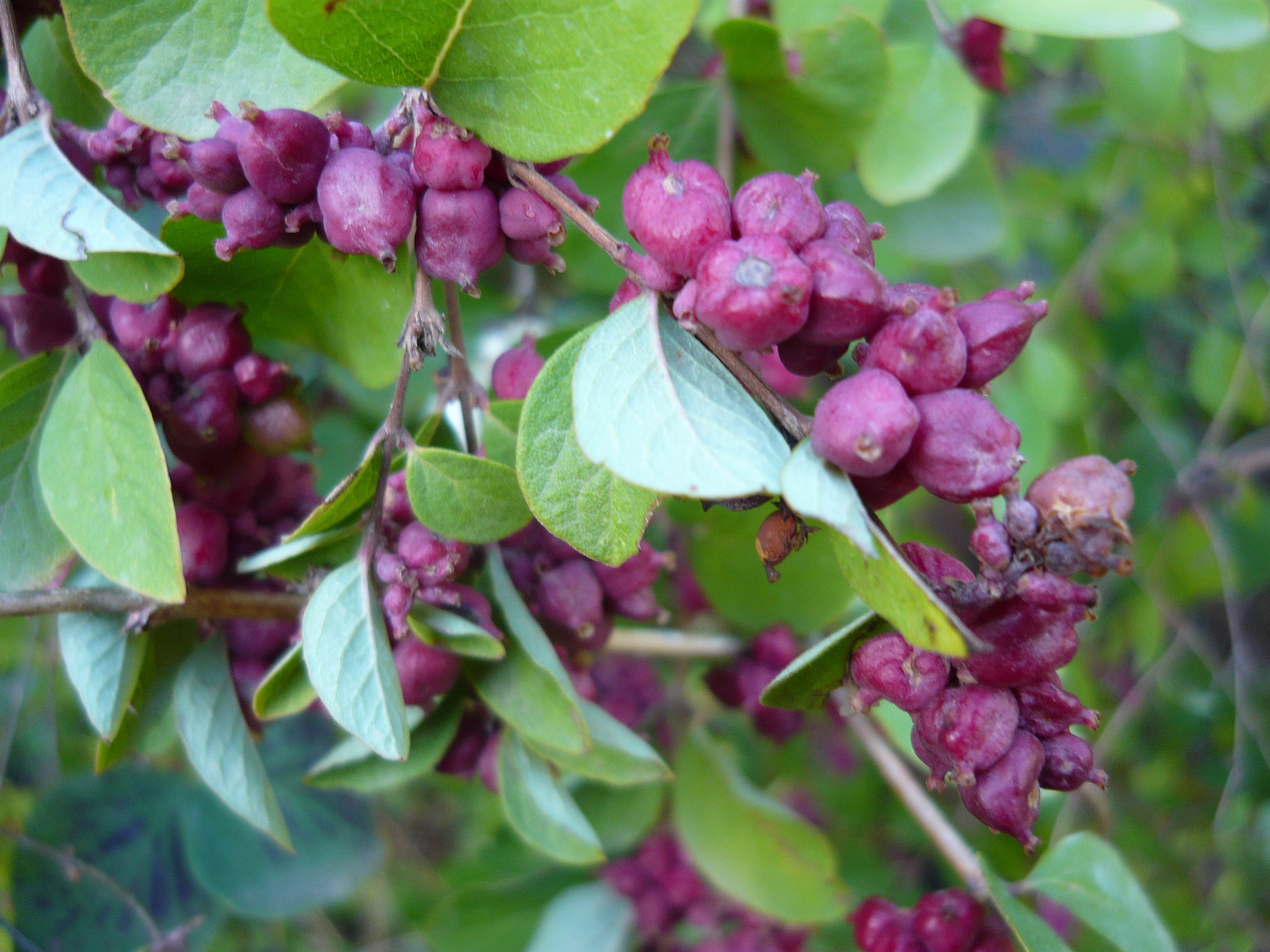 Symphoricarpos orbiculatus, frutos. Real Jardín Botánico de Madrid